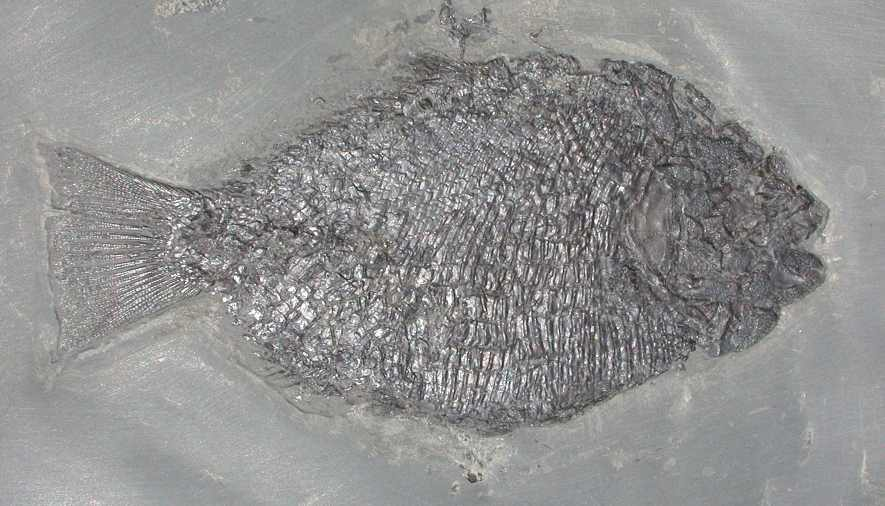 Dapedium sp., Kollektion Dr. Strangelove, Fotografie Dr. Strangelove.